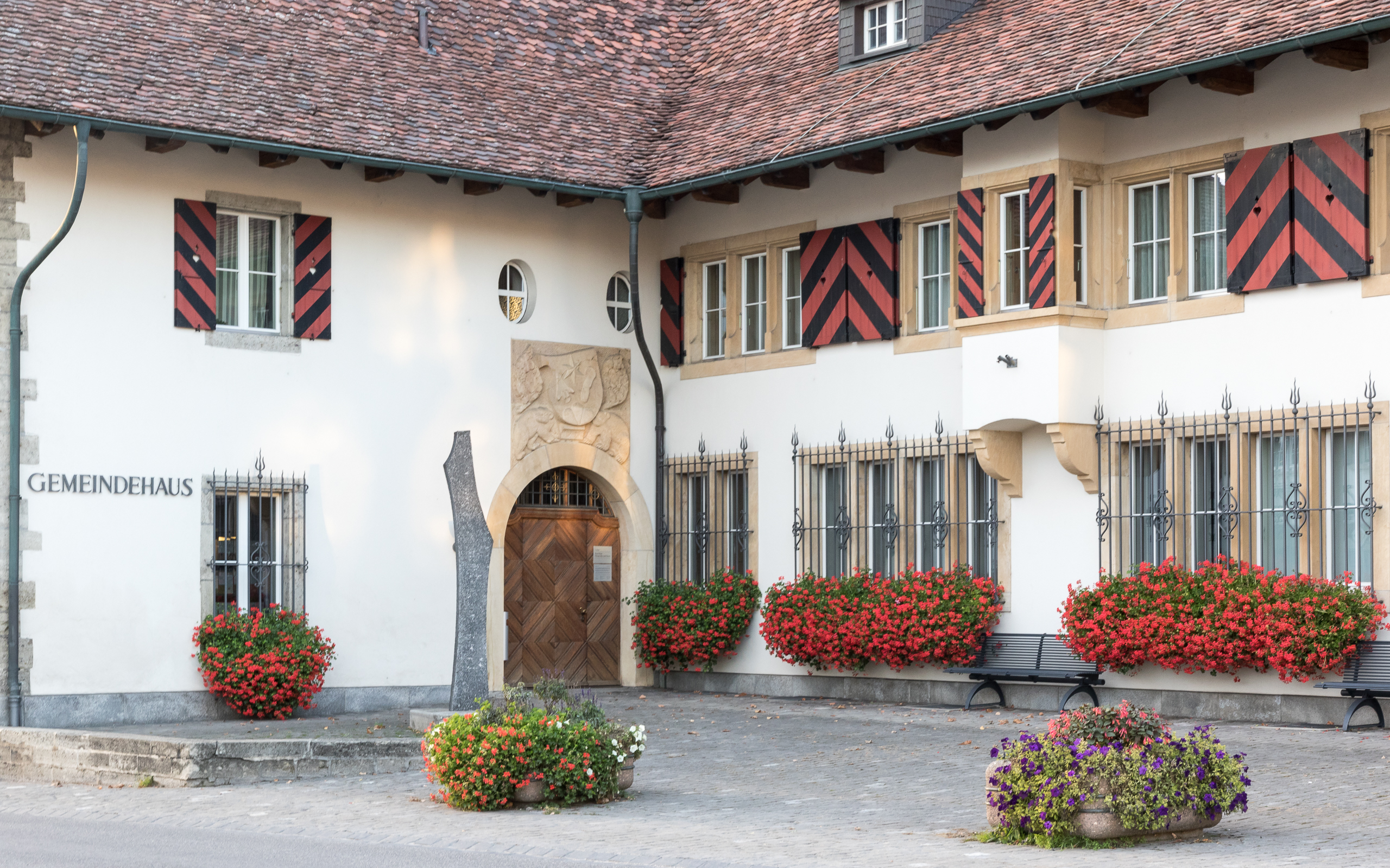 Gemeindehaus Ins BE